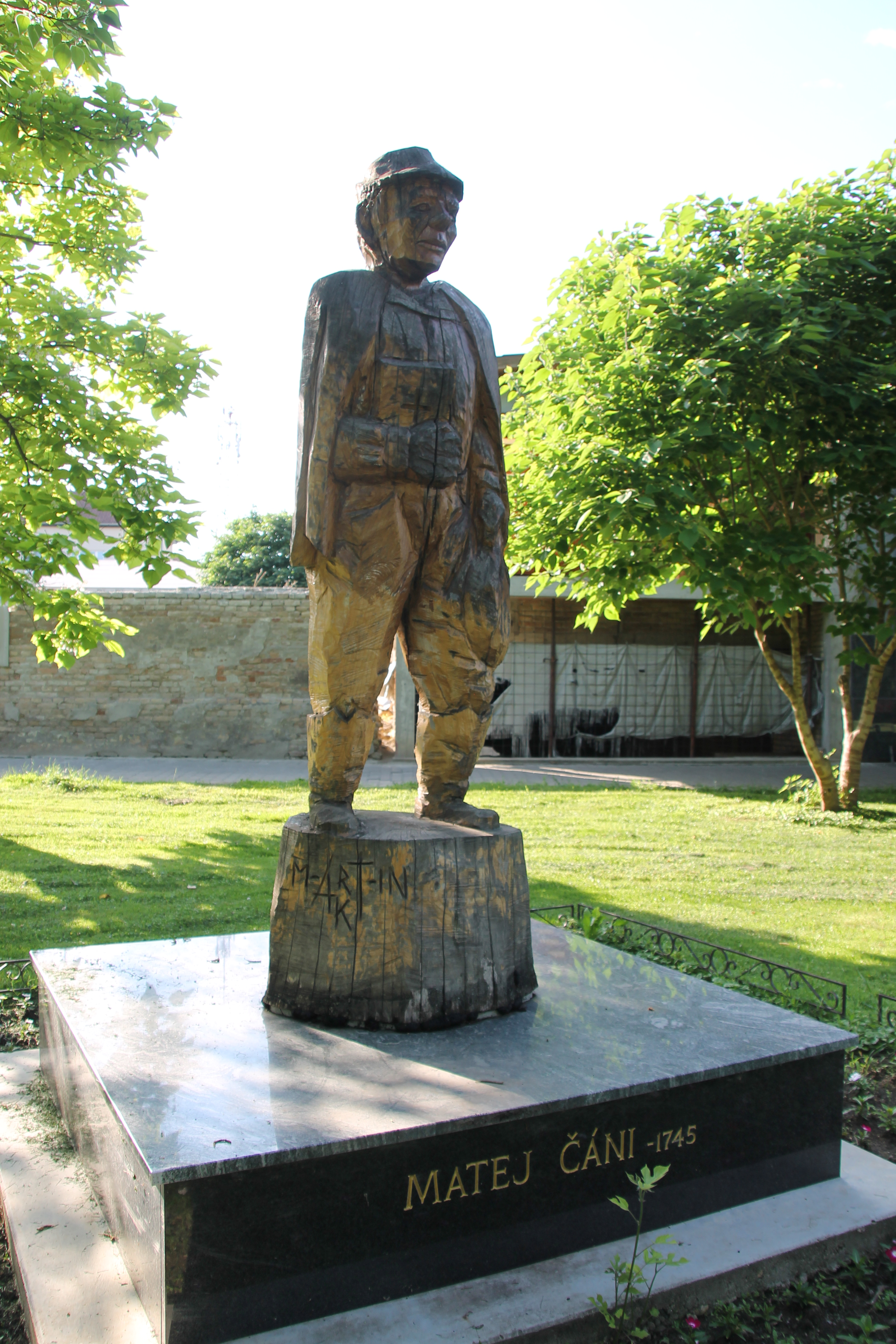 Bački Petrovac